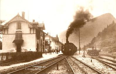 Chambrelien 5 minutes d'arrêt